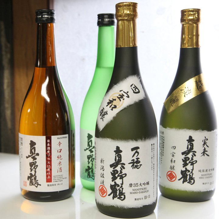 尾畑酒造の日本酒